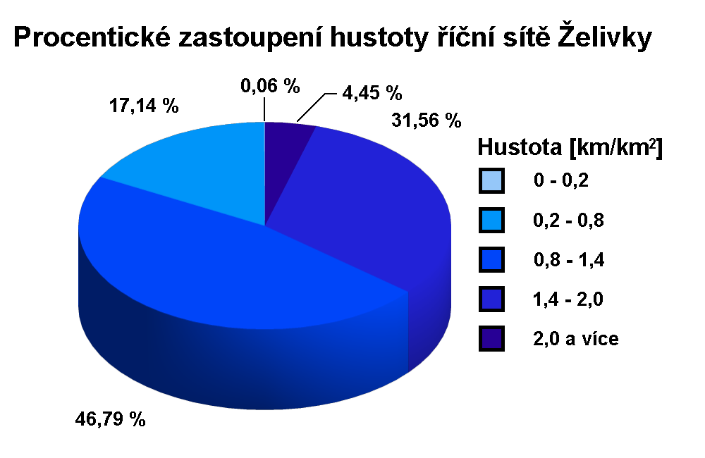 Procentické zastoupení hustoty říční sítě Želivky